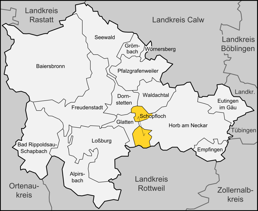 Karte der Gemeinde Schopfloch im Landkreises Freudenstadt